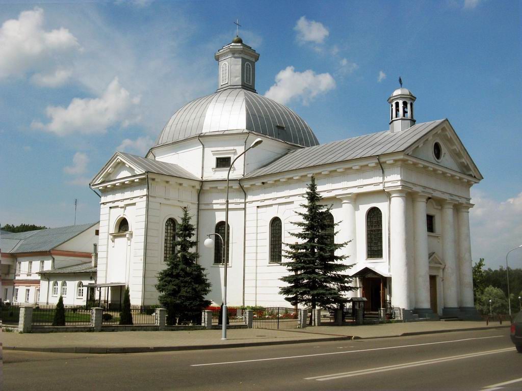 Беларуская (тарашкевіца): Шчучын